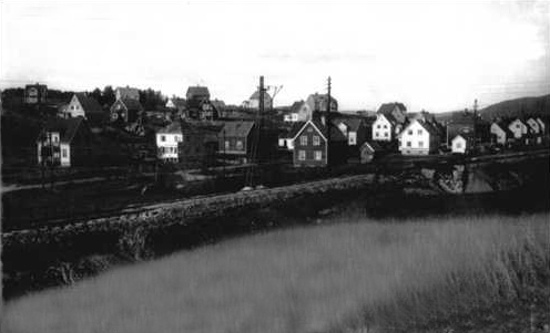 Tatt fra Damfaret mot nordvest. Man ser undergangen med Godliasvingen under trikkesporet. Siden Østensjøbanen var enkeltsporet fra Godlia til Oppsal fra 1926 til 1936 er bildet fra denne perioden.